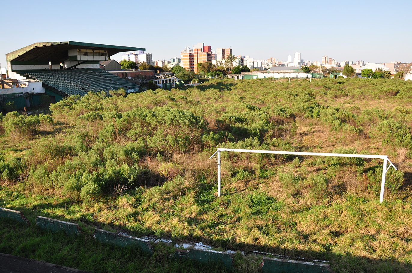 Situação do Estádio Wolmar Salton em setembro de 2010